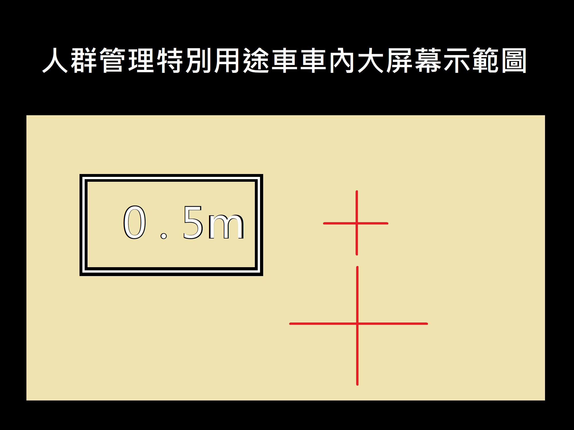 中文（香港）: 人群管理特別用途車車內大屏幕示範圖，根據《香港經濟日報》報導的配圖而製作。（配圖來源：水炮車內部運作曝光 人像清晰可見實時分析距離？）